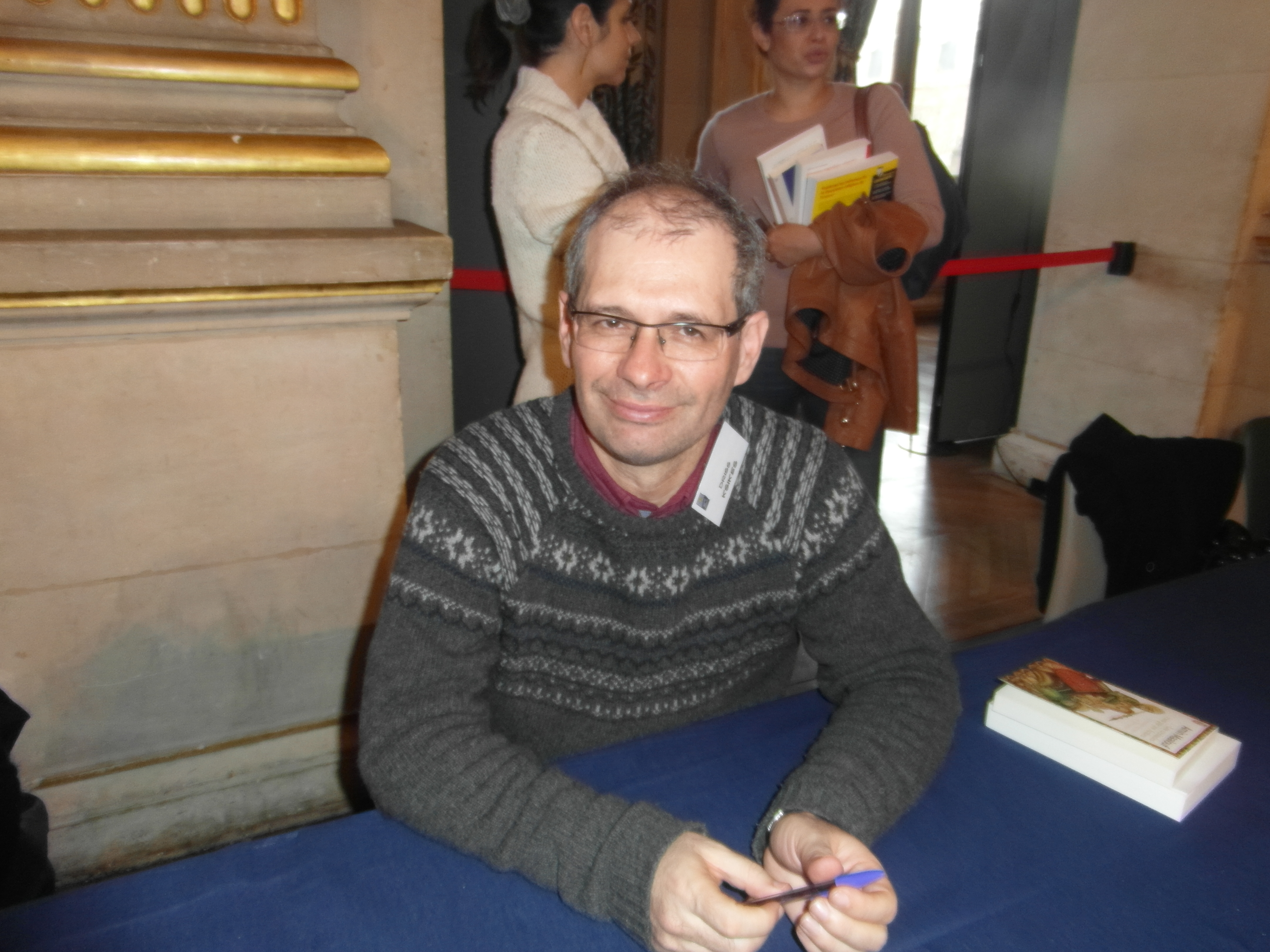 Maghreb des Livres, 7 et 8 février 2015